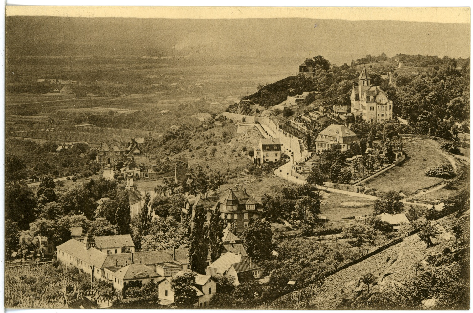 Radebeul; Kötzschenbroda Blick von der Friedensburg This postcard is from publisher Brück & Sohn in Meißen ( postcard has a unique number 18130 and is available in a higher resolution at the publisher. This images was uploaded in a cooperation project between Wikipedians and the publisher.